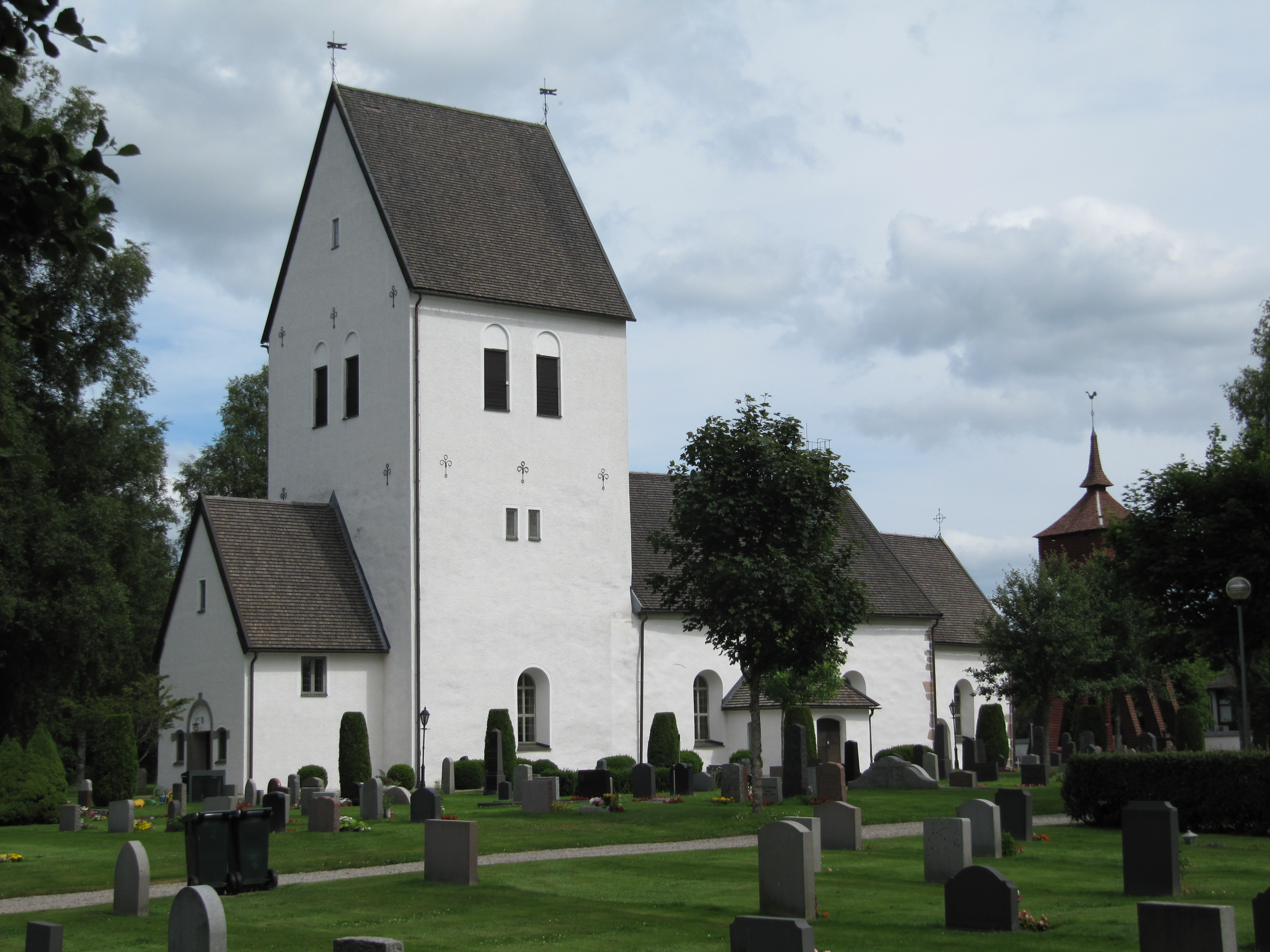 Moheda kyrka